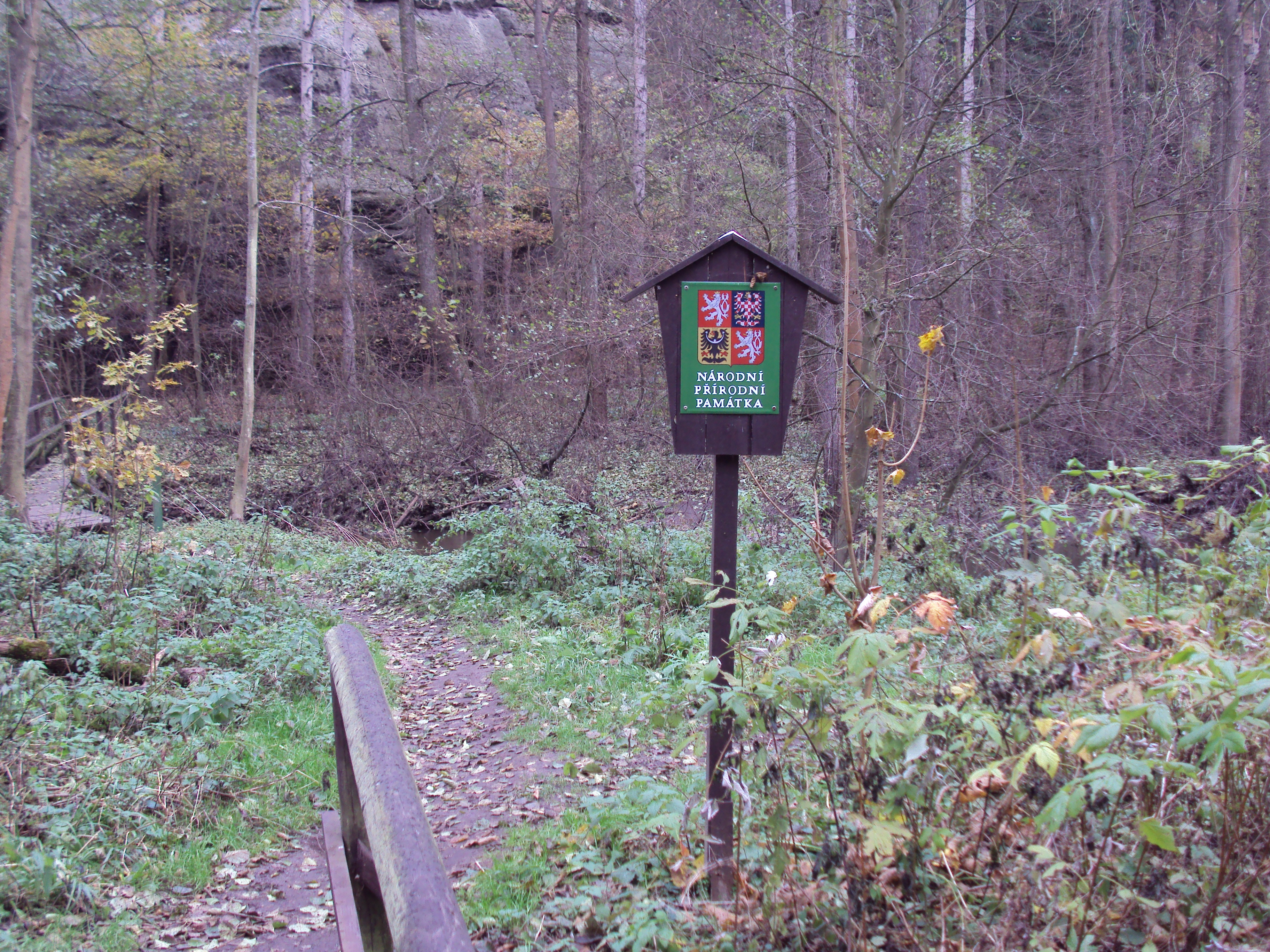 Cedule označující začátek chráněné oblasti Peklo, vstup od Zahrádek